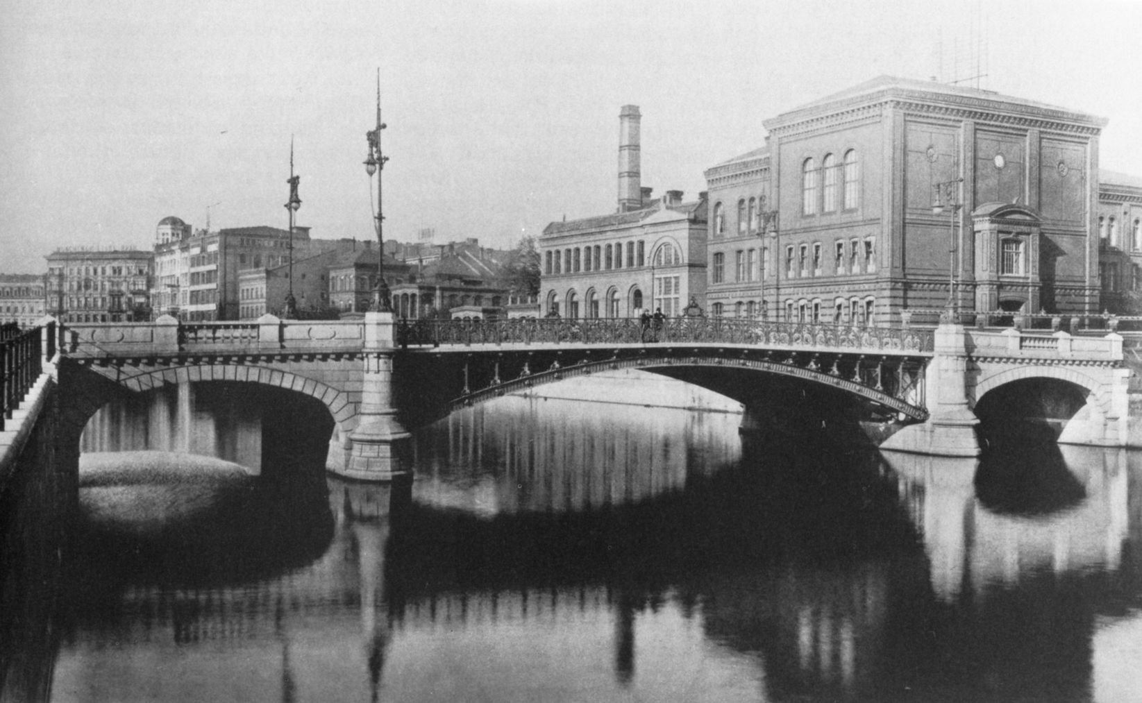 Ebertbrücke (eigentlich Ebertsbrücke bzw. Eberts Brücke) über die Spree in Berlin, eingeweiht im Oktober 1894